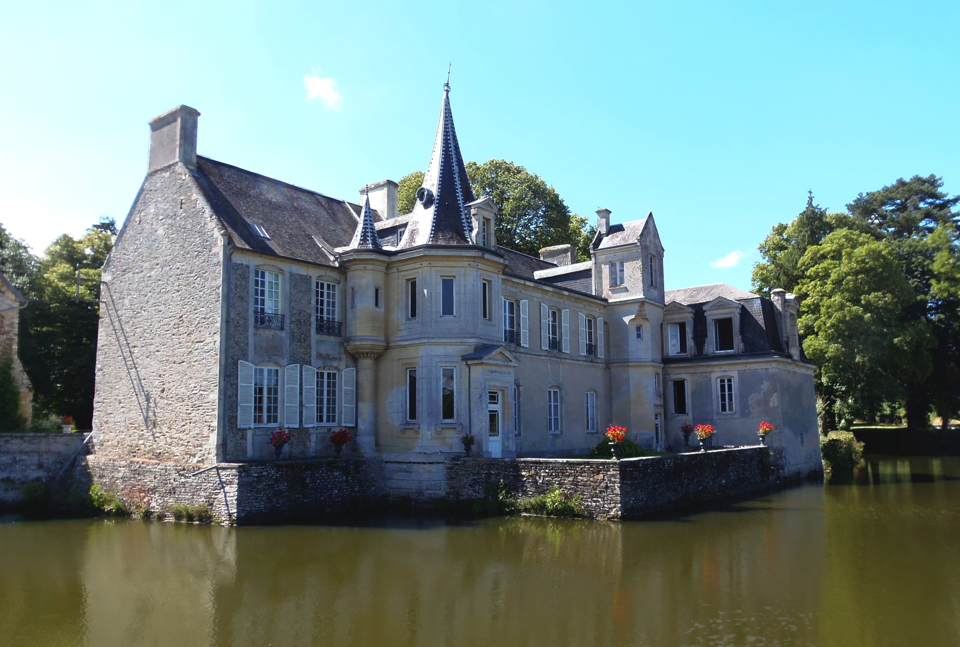 Livry (Normandie, France). Le château de Parfouru.